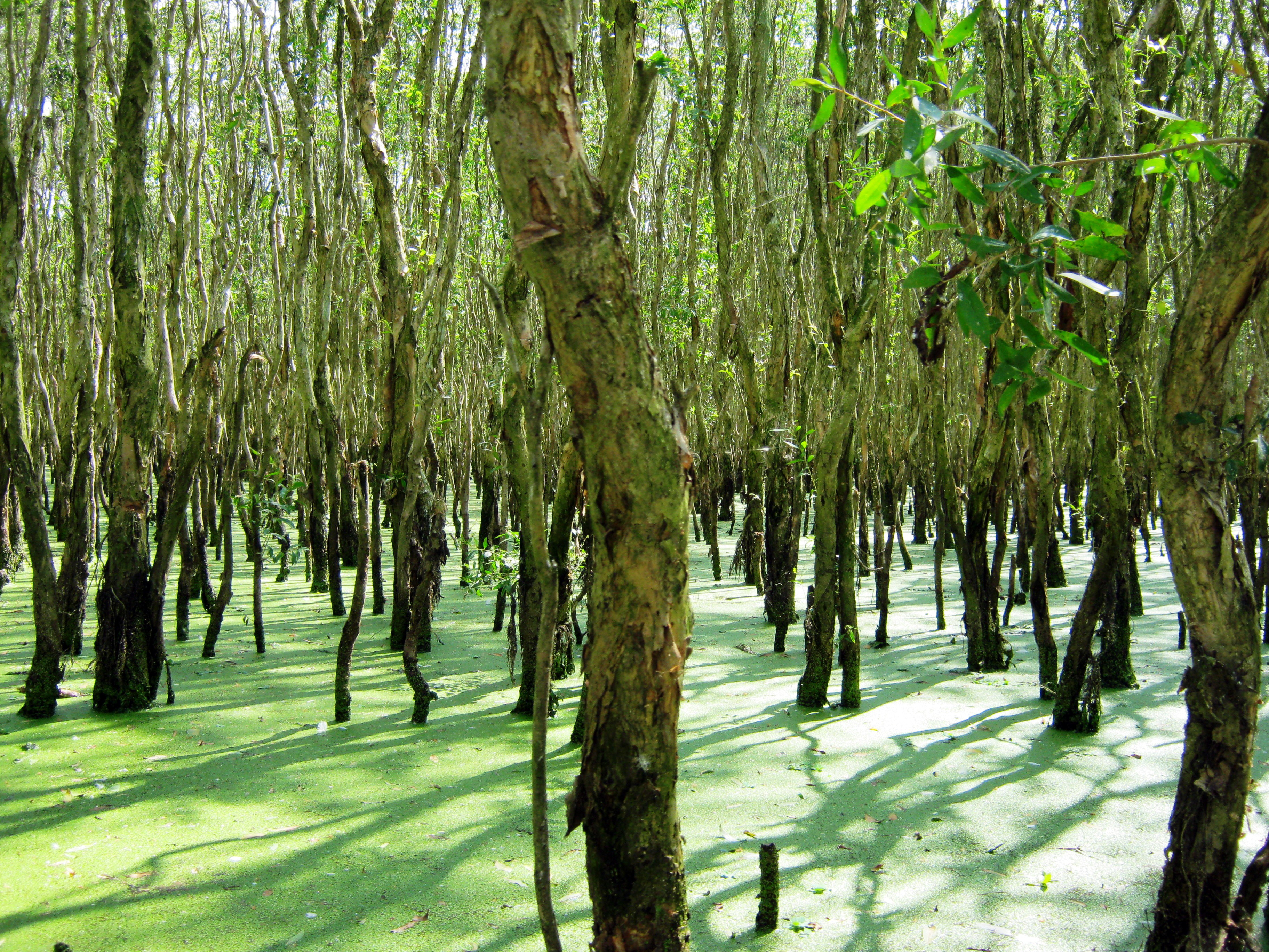 Rừng tràm Trà Sư (Tịnh Biên, An Gaing, Việt Nam).